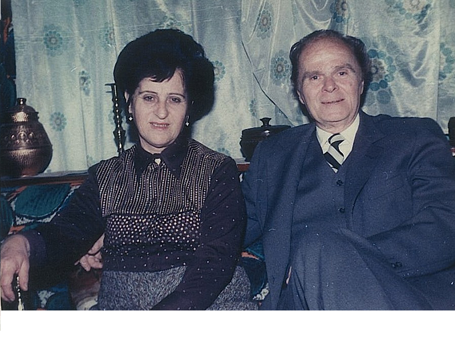 Foto te ndryshme nga jeta e Panajot Kanaçit